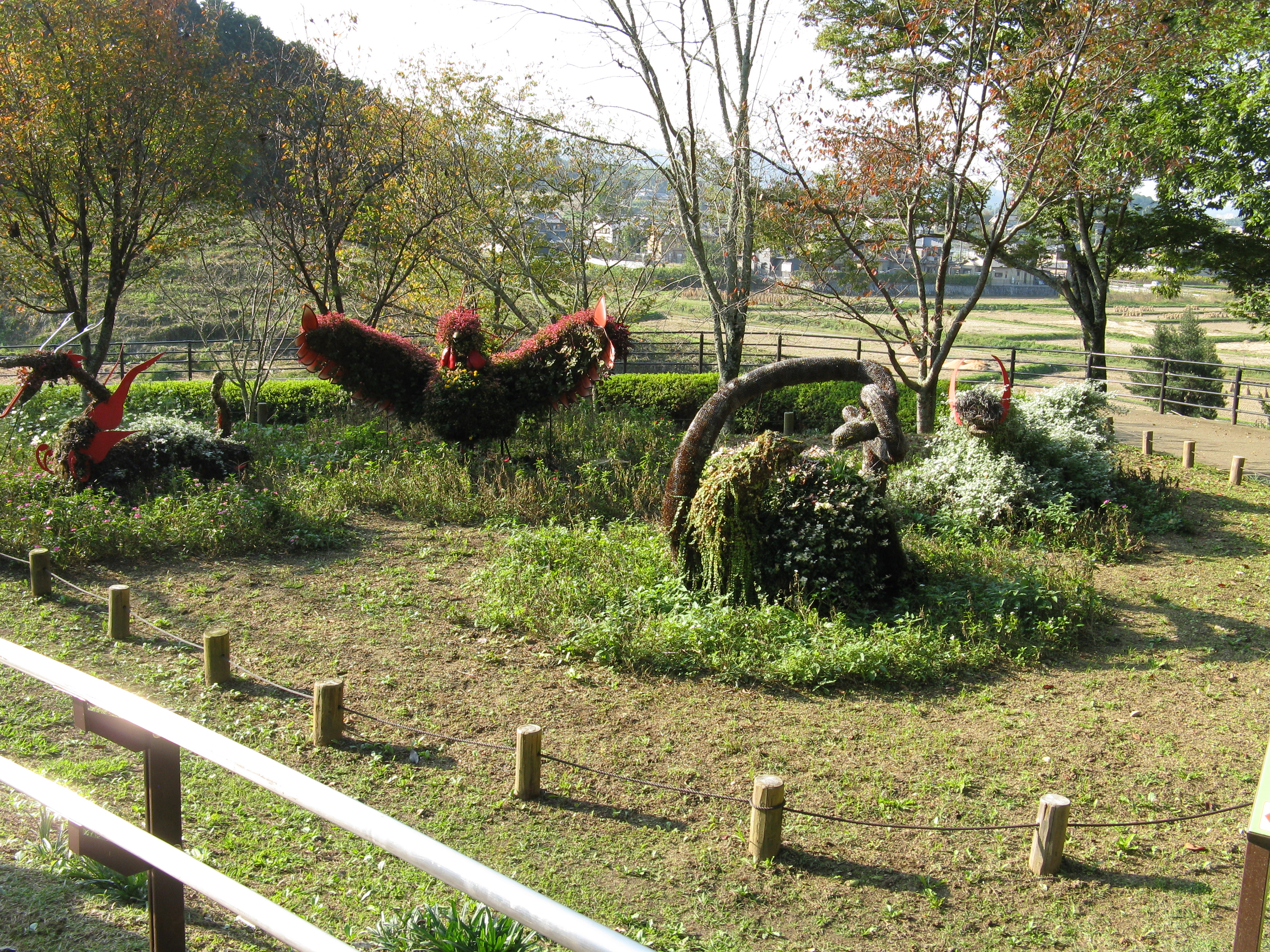 国営飛鳥歴史公園 高松塚周辺地区